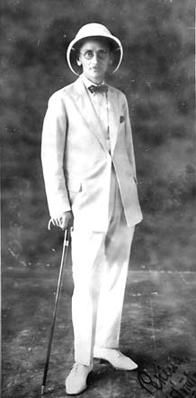 Христофор (Кристап) Интович Салнынь (1885-1939) - советский разведчик